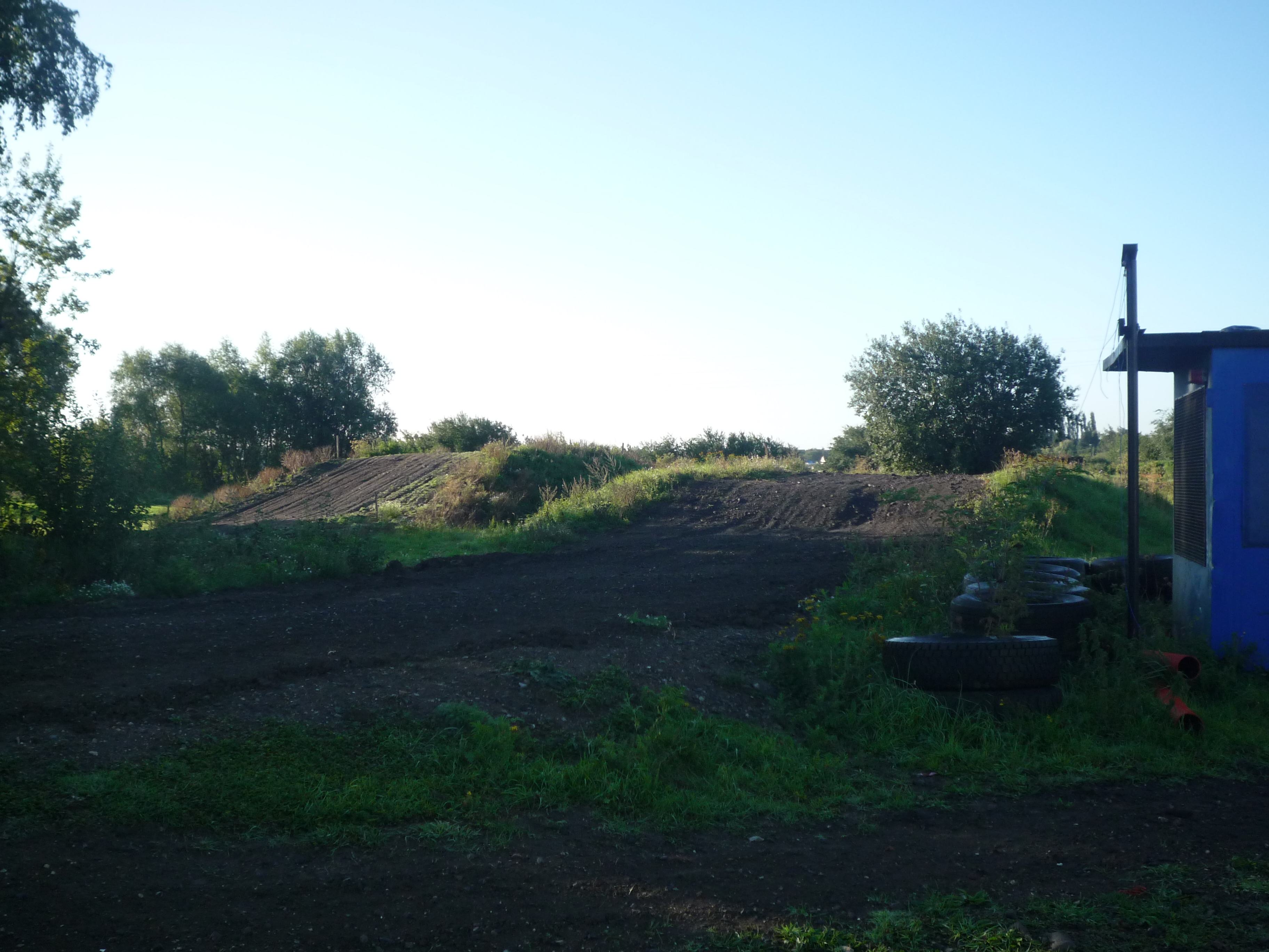 Terril Lambrecht Est de la Fosse Lambrecht de la Compagnie des mines d'Anzin à Wallers, Nord, Nord-Pas-de-Calais, France.